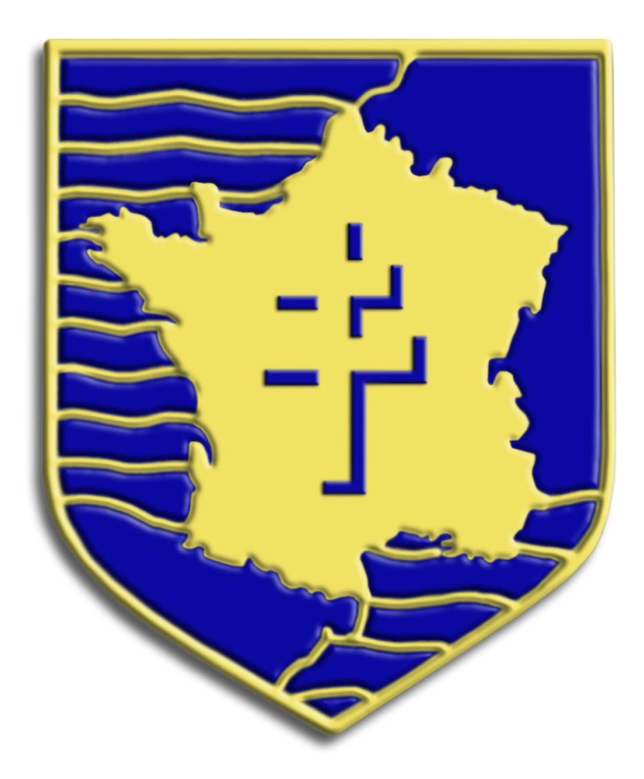 Insigne de la 2e DB - armée française.